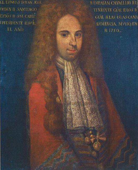 Retrato del militar español Francisco José de Emparan (1676-1740), que fue caballero de la Orden de Santiago, teniente general de los Reales Ejércitos y gobernador de Canarias.